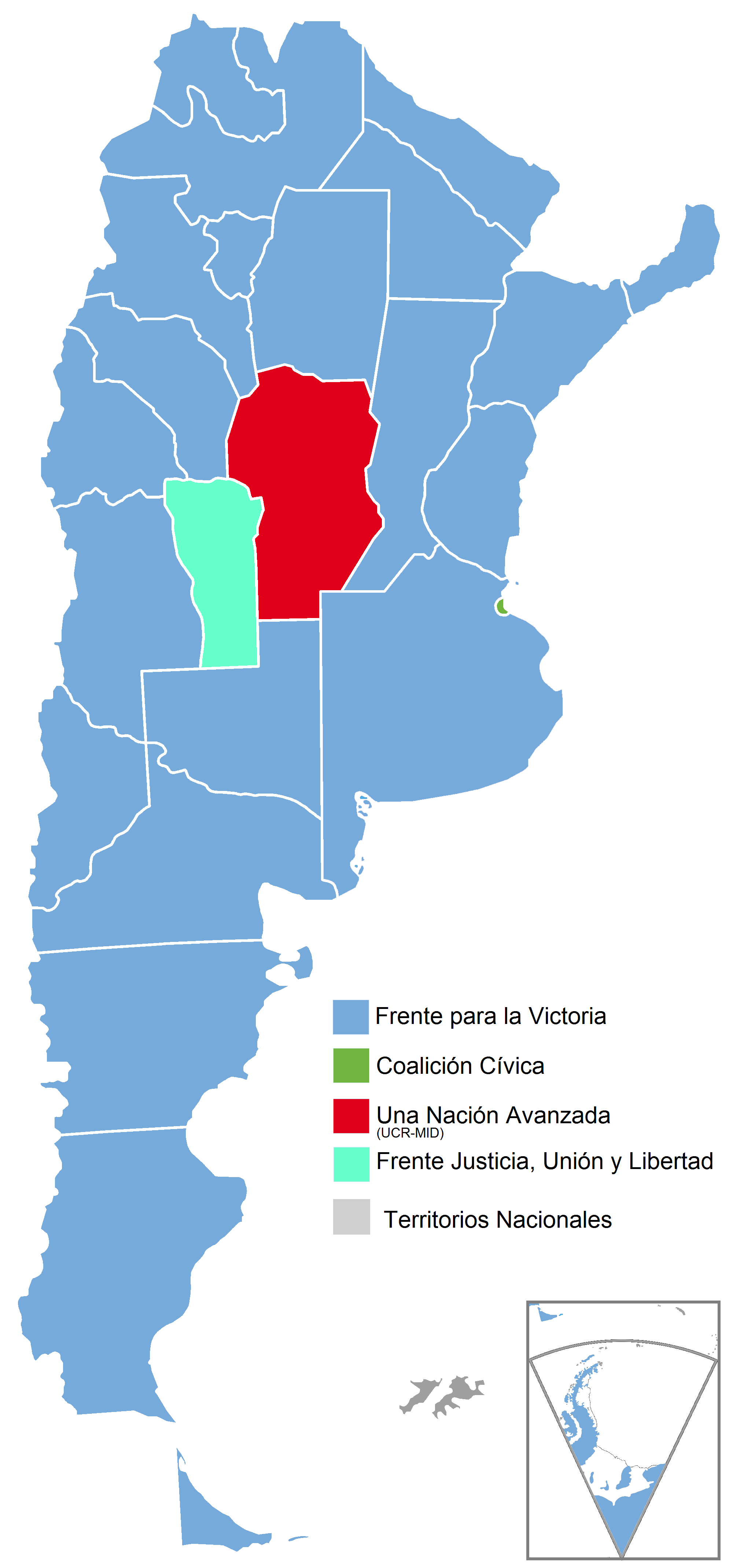 Mapa de las elecciones presidenciales de Argentina de 2007